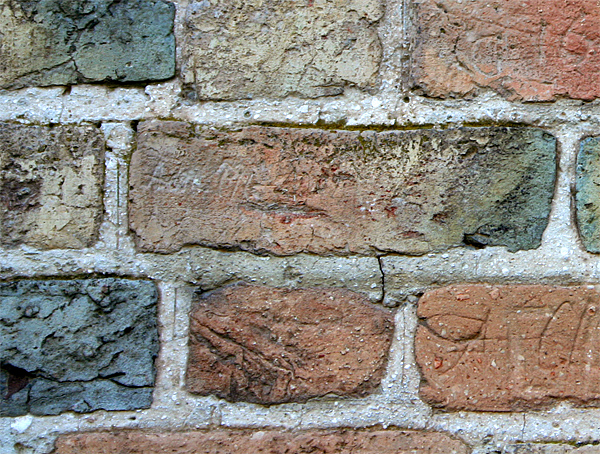 знак на шві